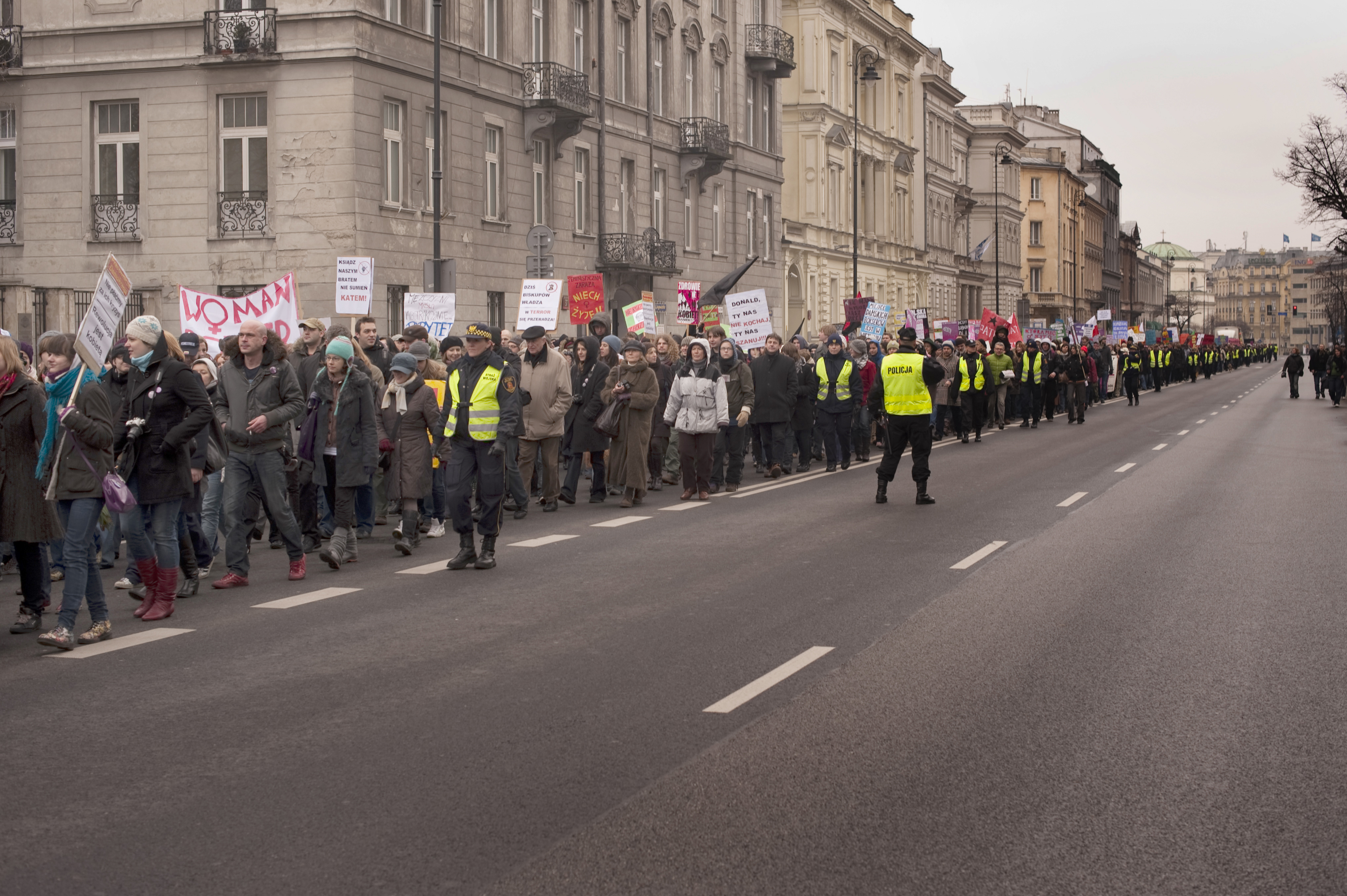 Warszawa - Manifa 2009.